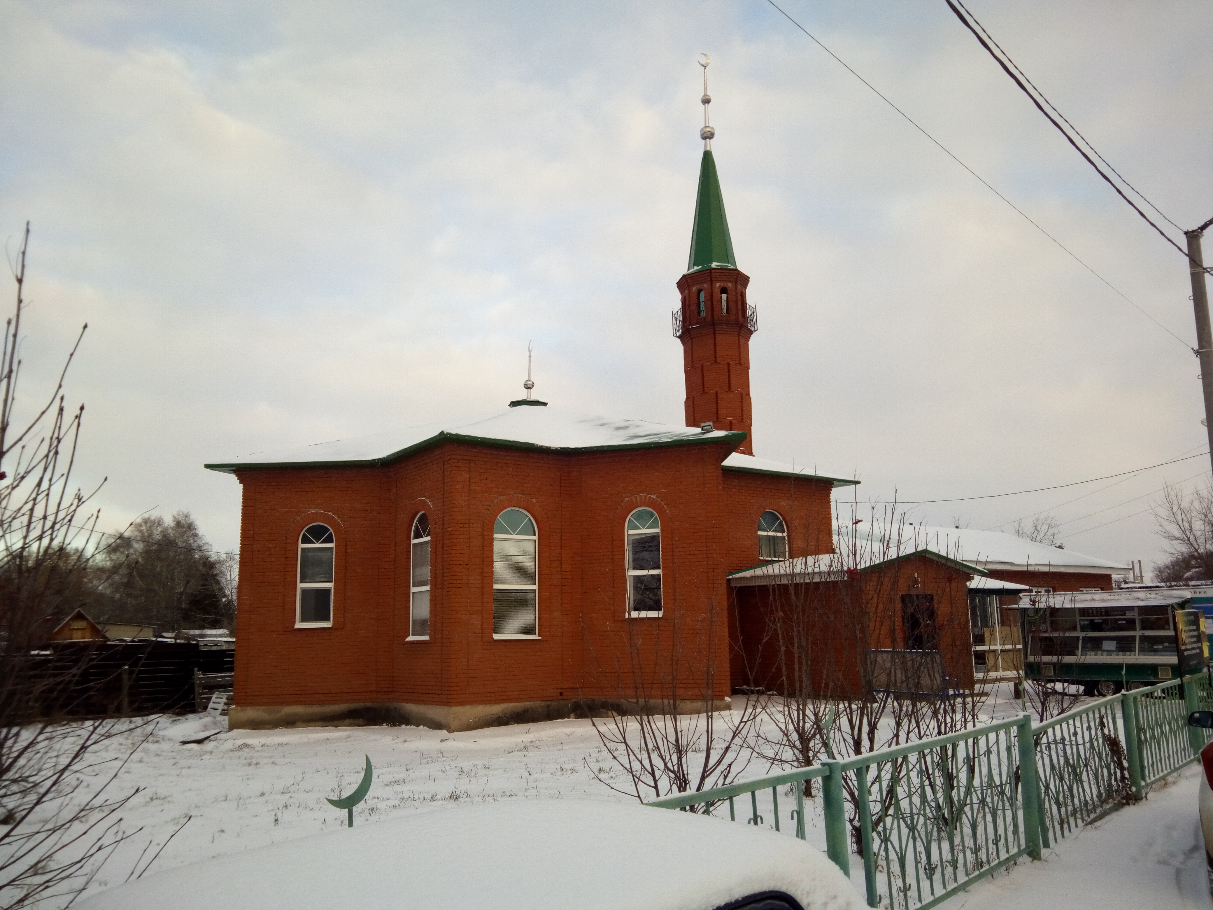 Деревня Миловка в Уфимском районе, Башкортостан.